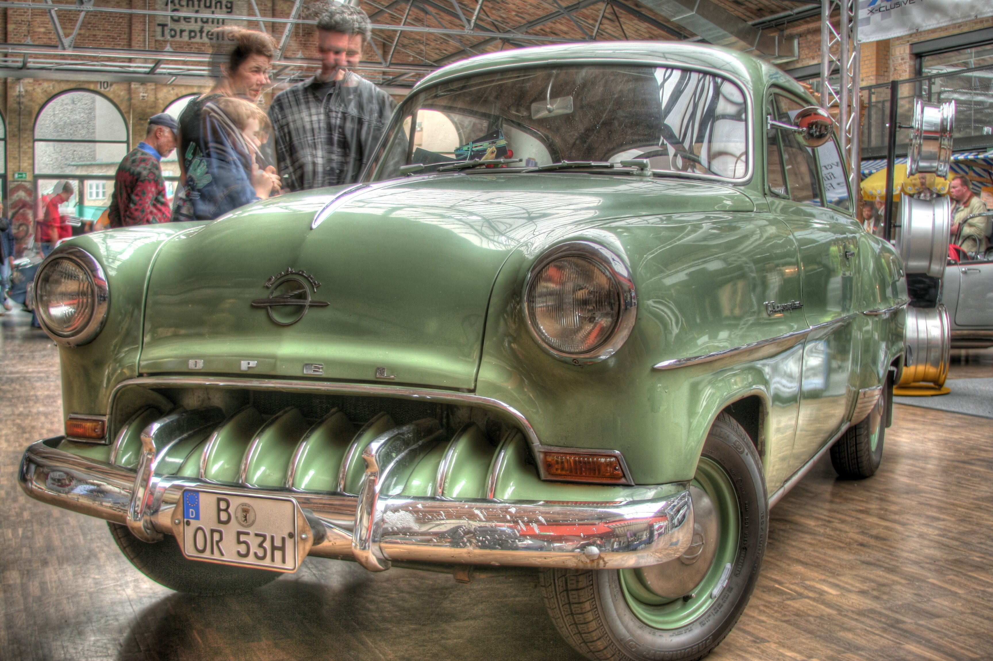 An old German Opel.